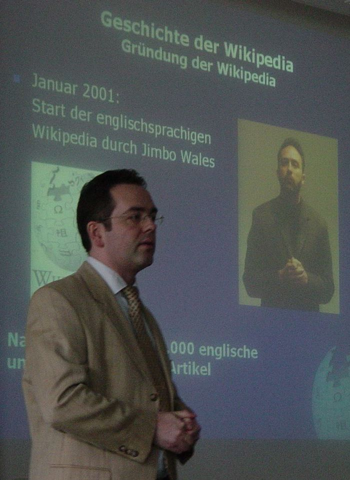 Wikimedia-Schulprojekt in Hilden, Nordrhein-Westfalen, am 20. Januar 2007 Upload und Veröffentlichung unter Creative-Commons-Lizenz mit Einverständnis des Erstellers.